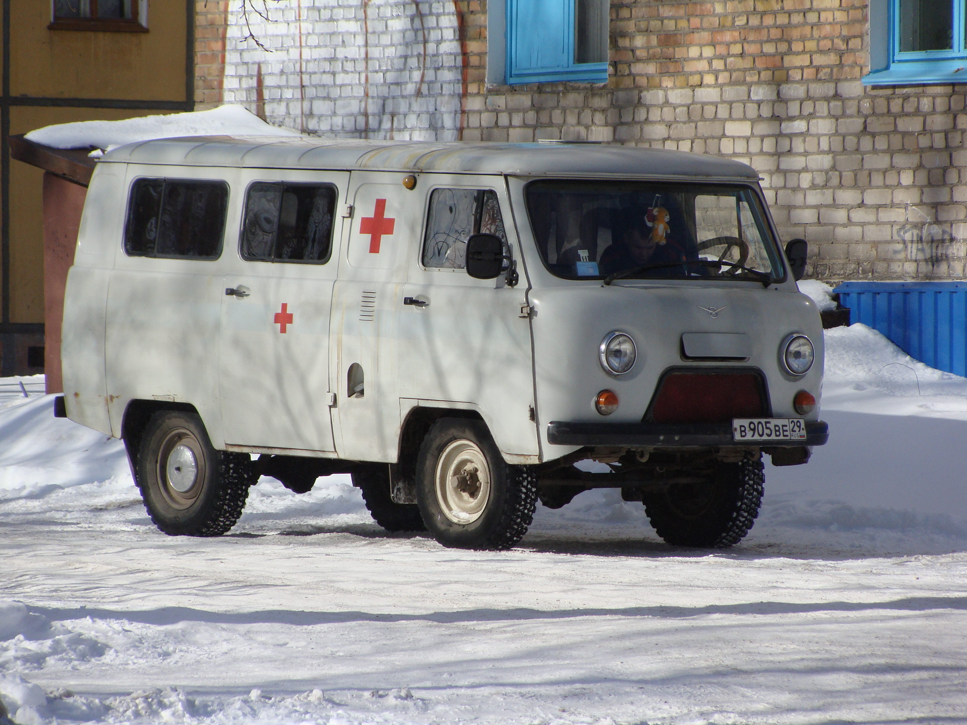 УАЗ 452 мед. служба. Светло-серый. Коряжма.